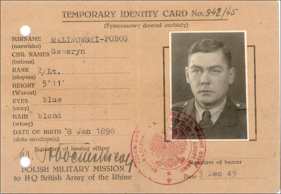 Seweryn_Malinowski_-_zasswiadczenie_PSZ